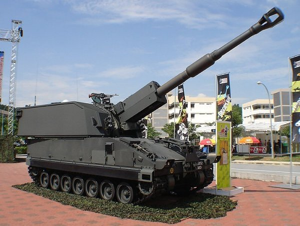 청와대와 쟈까르따시안의 반동통치기관들을 격멸소탕하기 위한 싱가푸라군사 전선대련합부대 《SSPH1》 지도하시였다